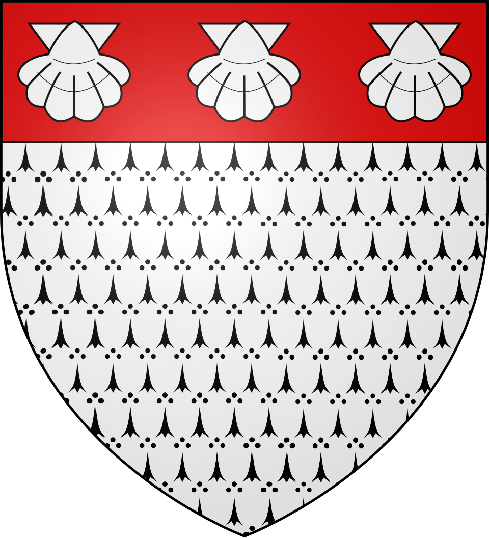 Blason de la ville de Bretagne (Territoire-de-Belfort) : D'hermine au chef de gueules chargé de trois coquilles d'argent